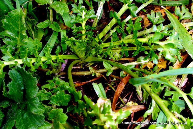 نباتات برّية سورية تؤكل